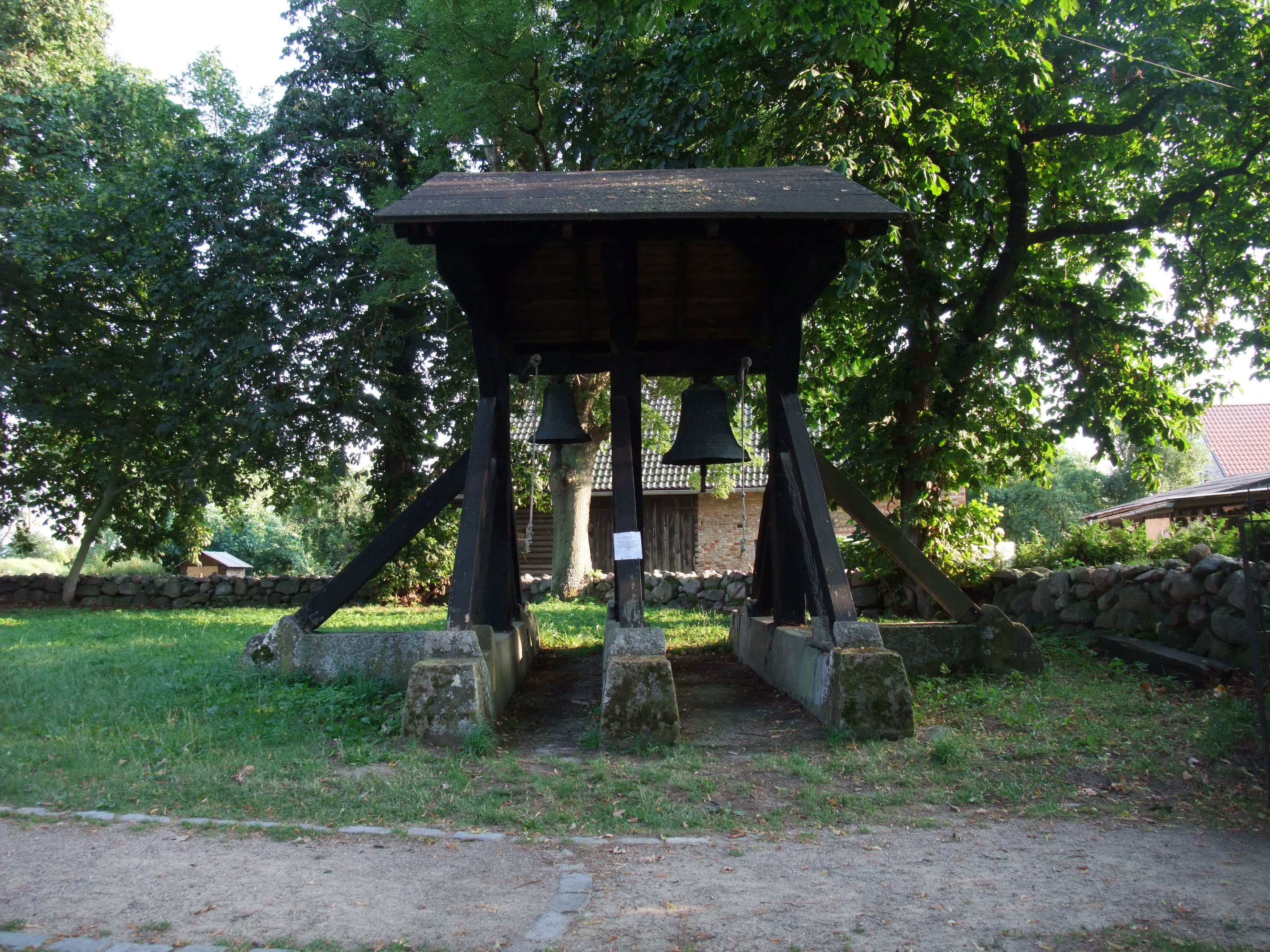 Marienkirche Netzelkow, Lütow, Deutschland